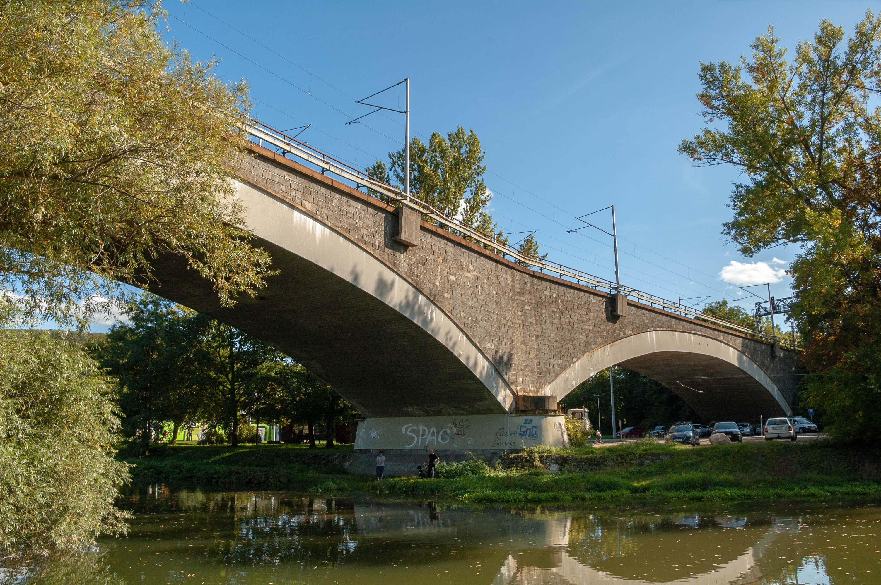 Železniční viaduktv Obřanech